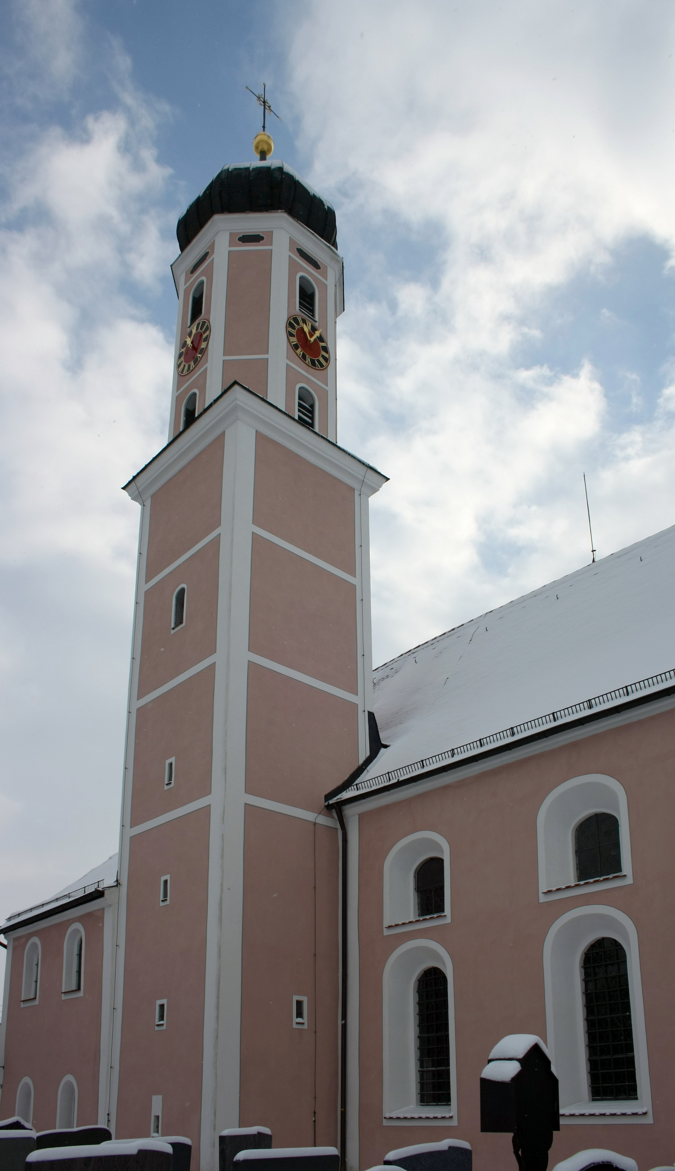 Katholische Pfarrkirche St. Michael in Lutzingen, einer Gemeinde im Landkreis Dillingen an der Donau (Bayern), Turm mit Zwiebelhaube, Ansicht von Norden